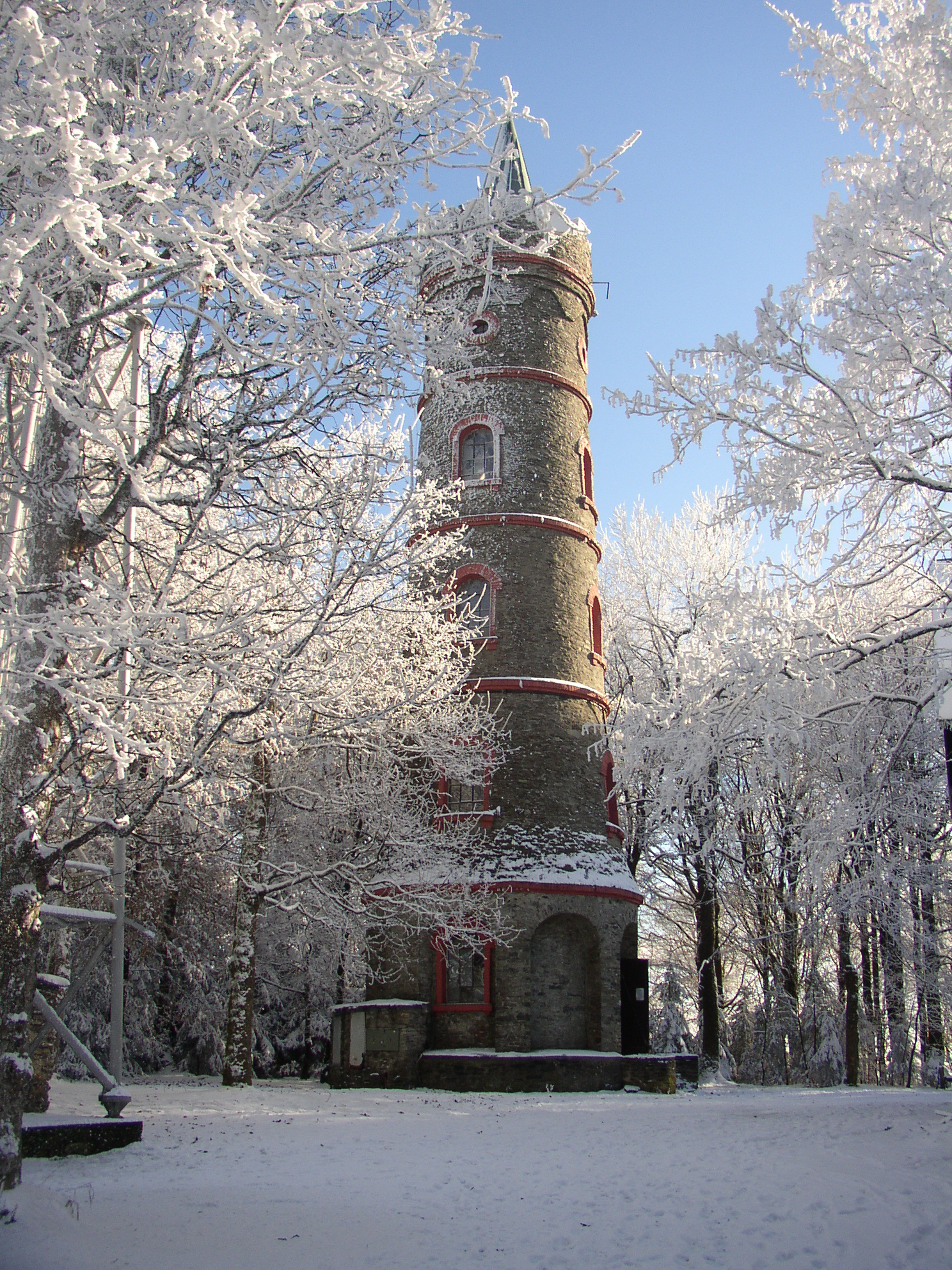 Jedlová rozhledna 13. listopadu 2016